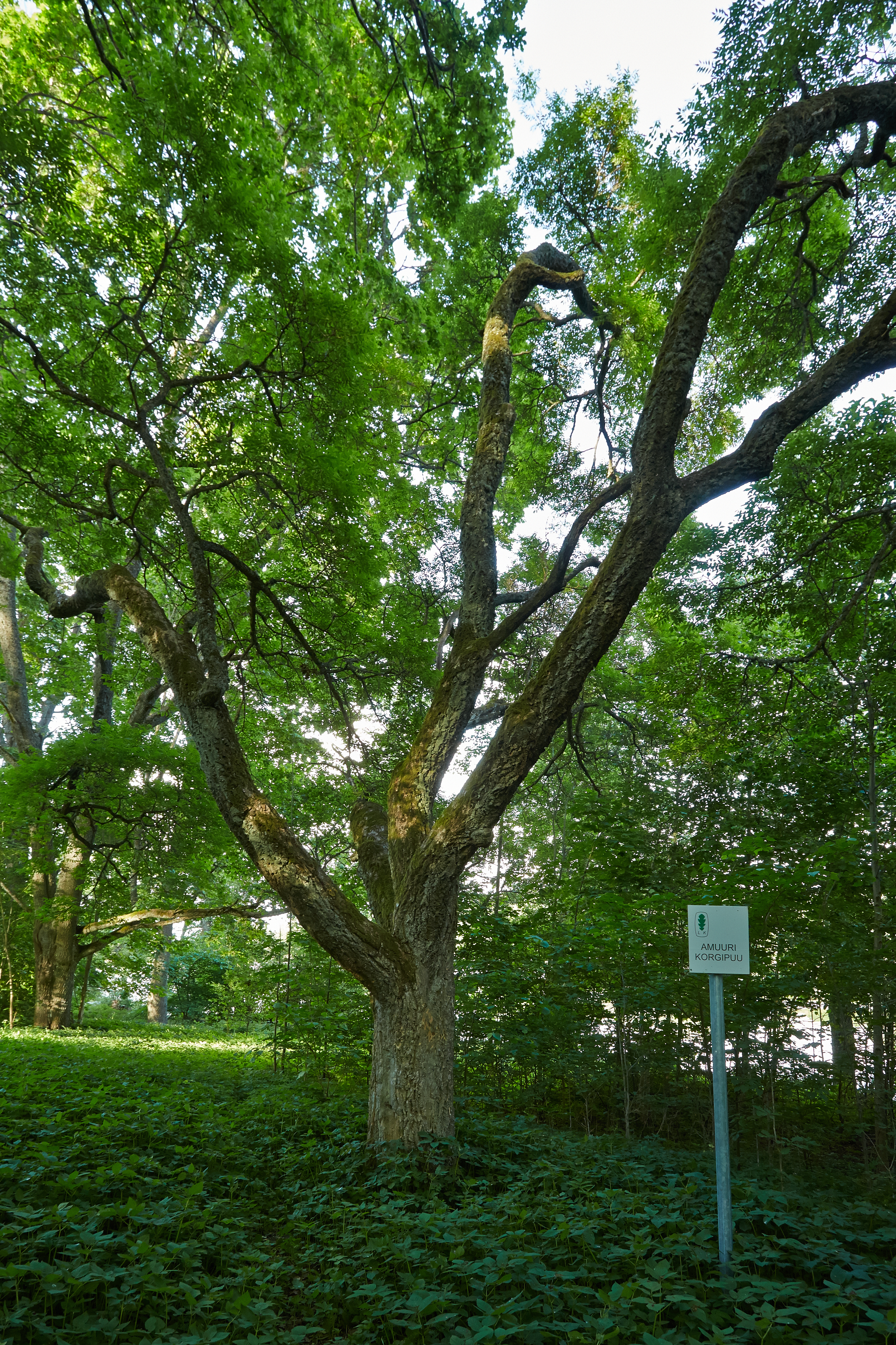 Amuuri korgipuu Tilsi mõisapargis